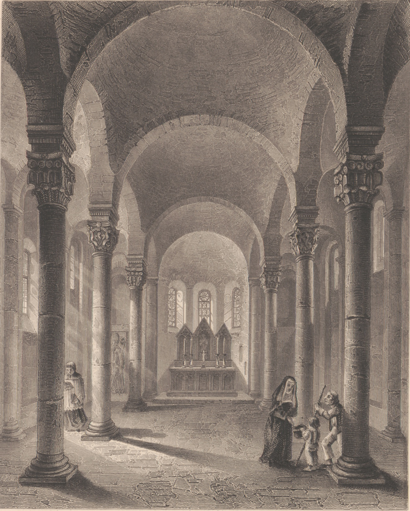 Die S. Bartholomaeuskapelle in Paderborn